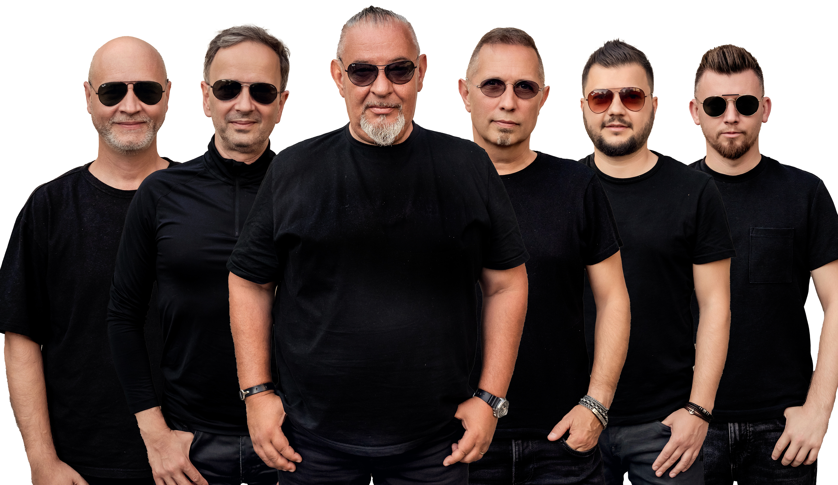 Formatie Pop - Rock